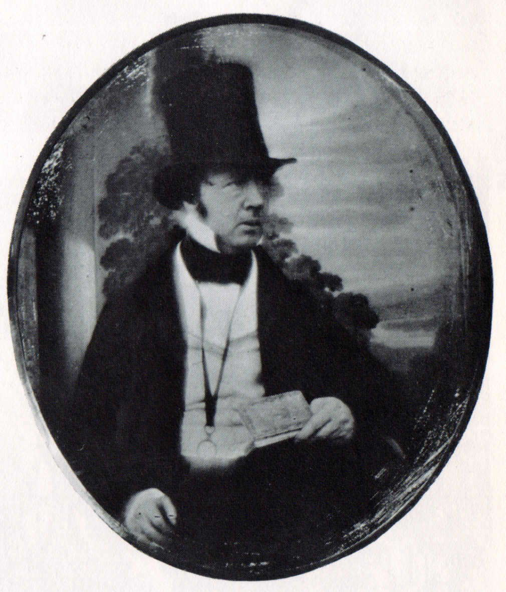 William Henry Fox Talbot (180-1877), englischer Orientalist und Fotopionier